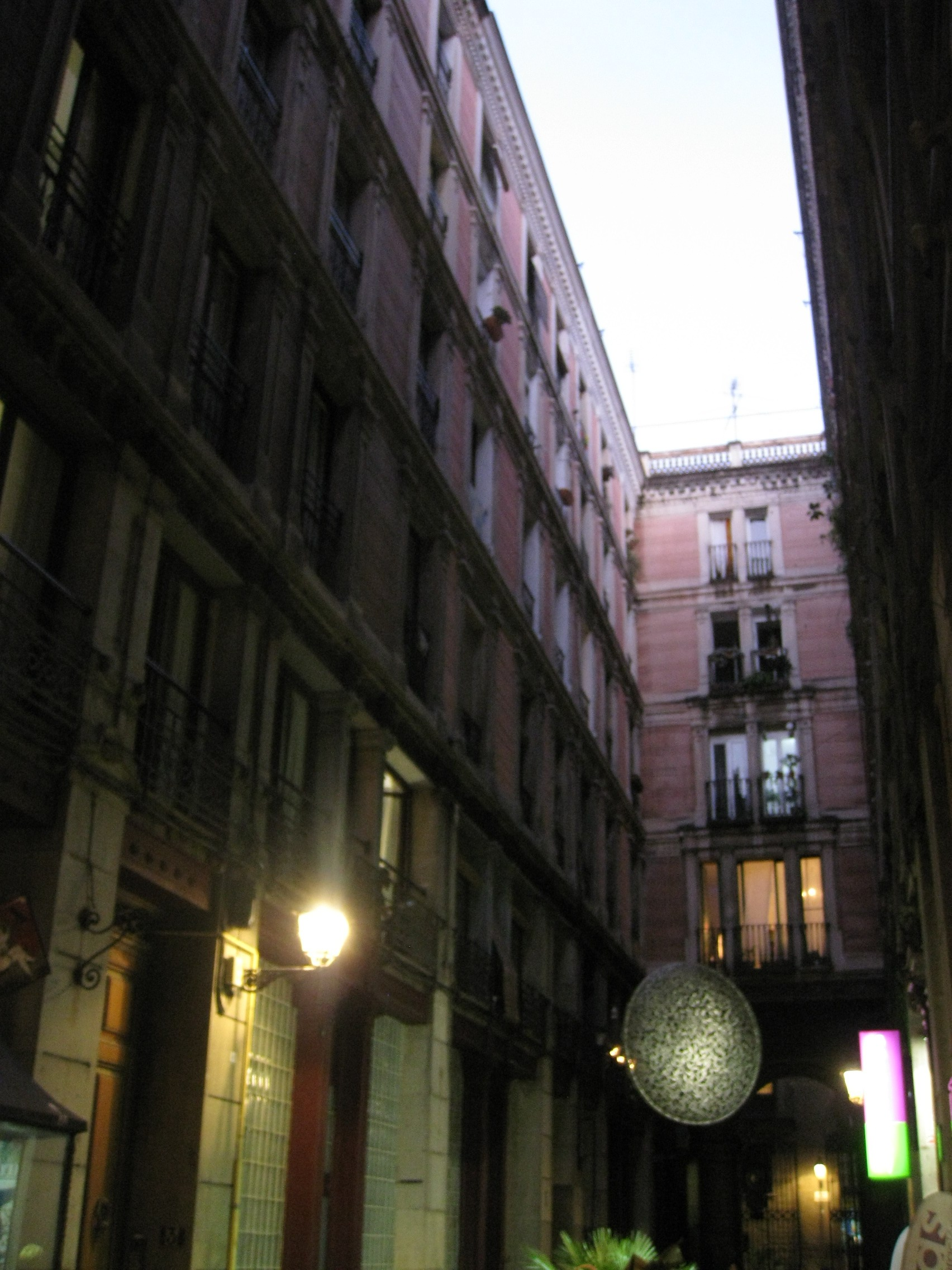 El passatge del Crèdit (1875-79), al barri Gòtic de Barcelona